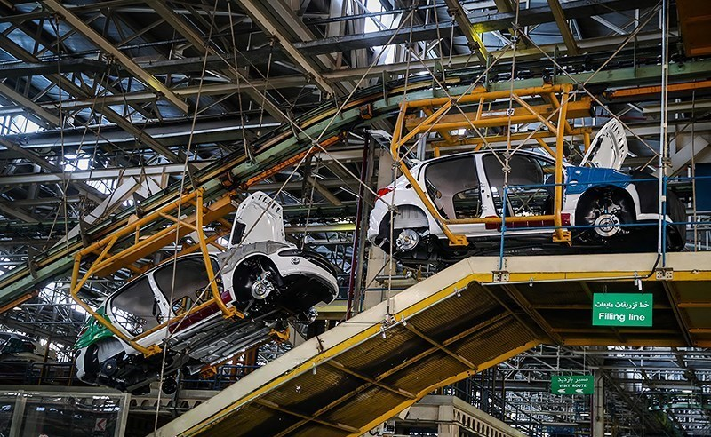 مراسم آغاز تولید دنا پلاس توربو و پژو ۲۰۷ i صندوقدار اتوماتیک محصولات جدید شرکت ایران خودرو